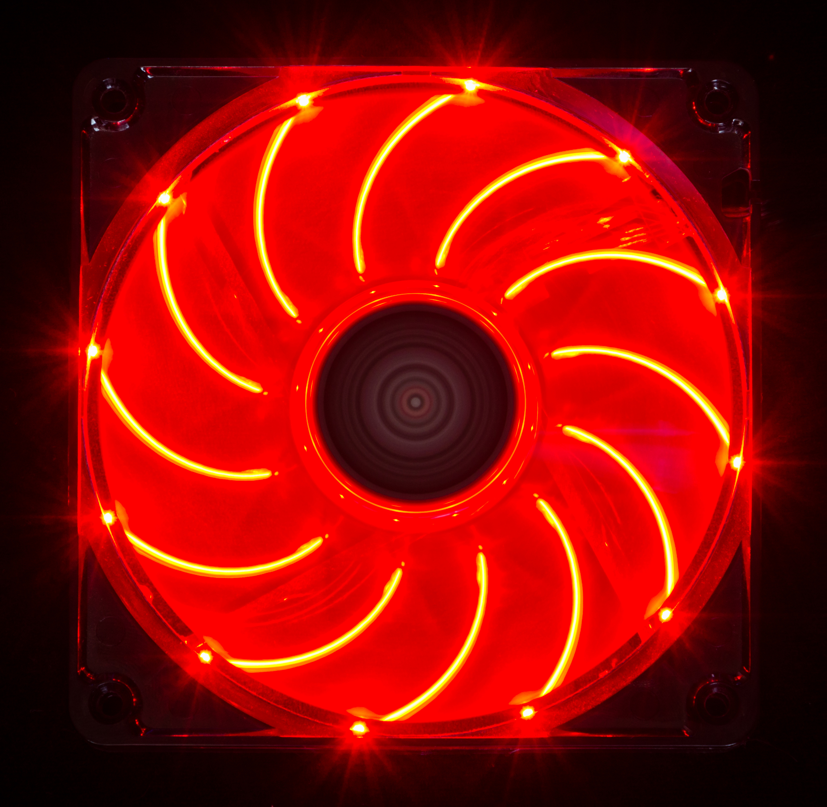 Wentylator komputerowy Enermax T.B.Apollish UCTA12N-R